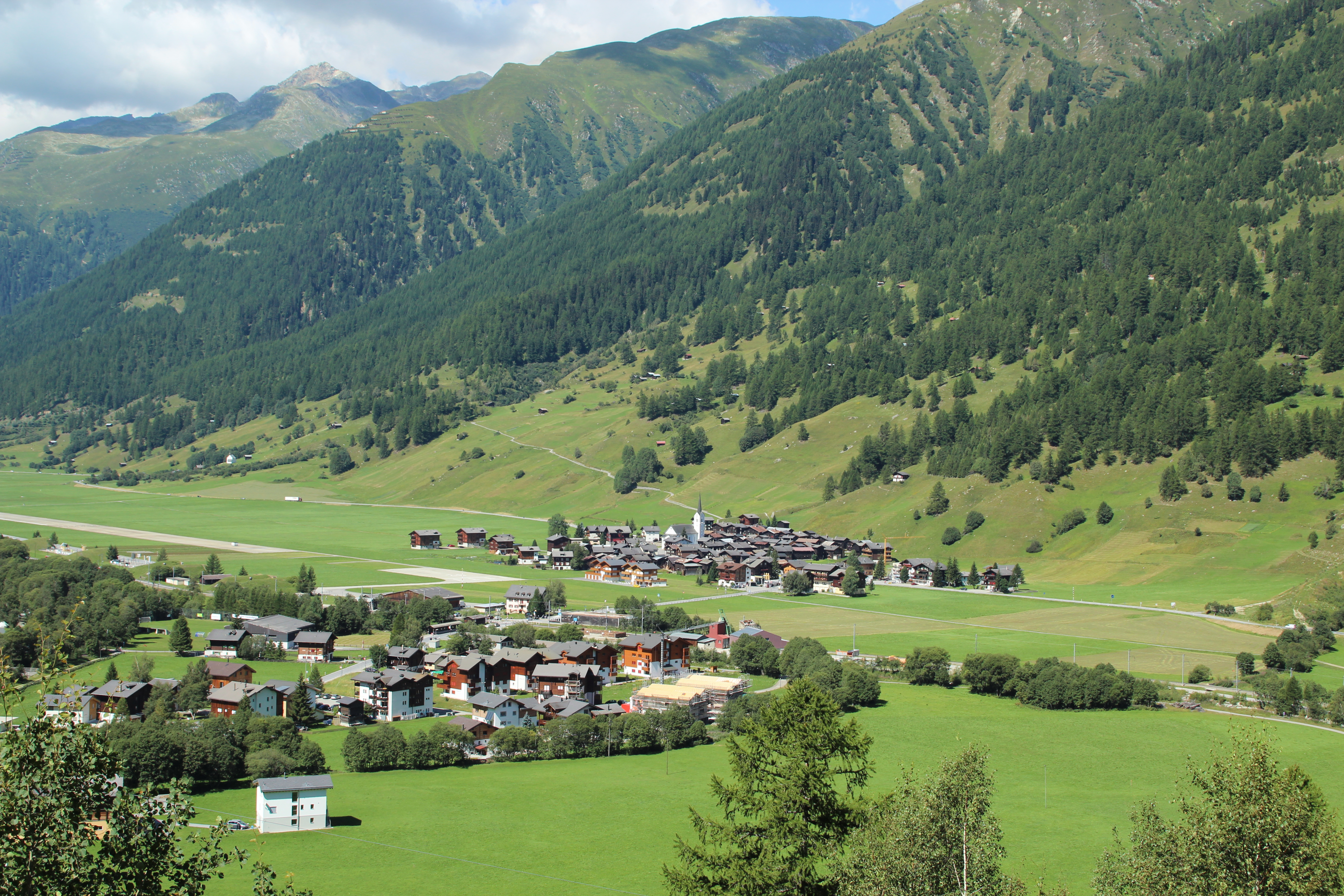 Ulrichen, Blick von Osten